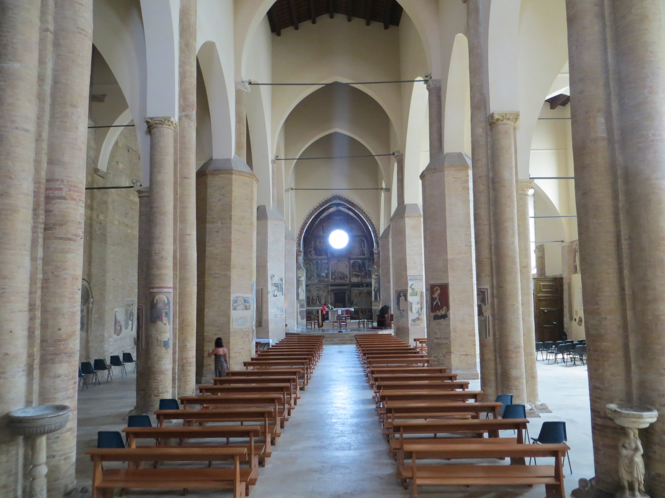 Interno del Duomo di Atri